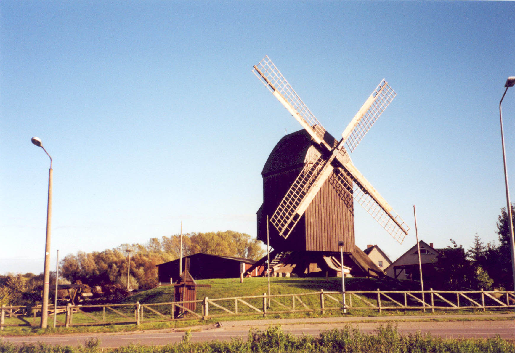 Bockwindmühle in Eldena/Greifswald